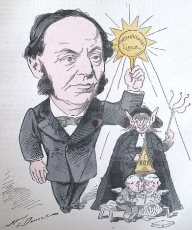 "E. de Ménorval".